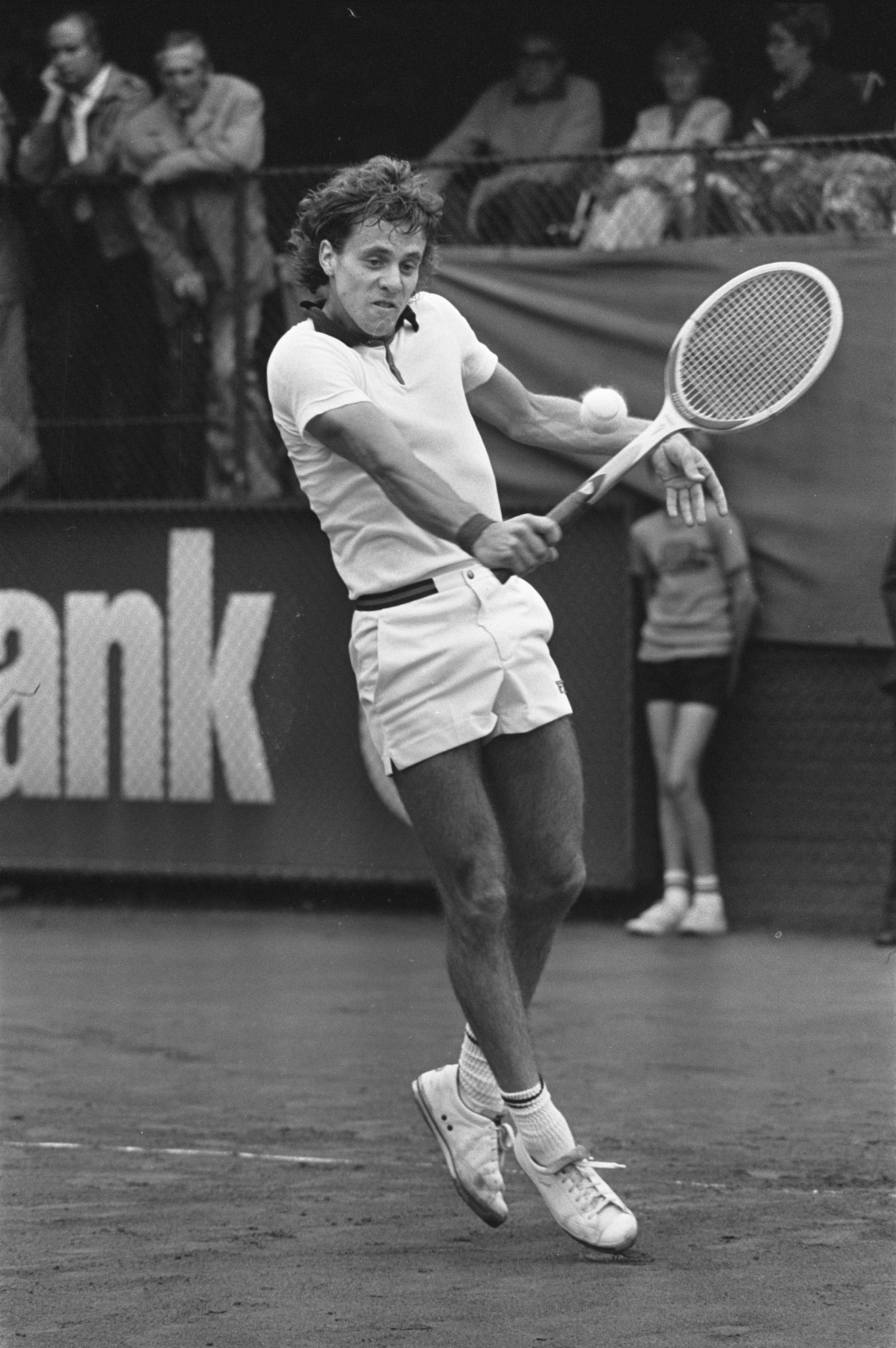 Collectie / Archief : Fotocollectie Anefo Reportage / Serie : Internationale tenniskampioenschappen 1975 op het Melkhuisje in Hilversum Beschrijving : Pinner (West-Duitsland) in actie Datum : 18 juli 1975 Locatie : Hilversum, Noord-Holland Trefwoorden : tennis, toernooien Persoonsnaam : Pinner, Ulrich Instellingsnaam : Melkhuisje, 't Fotograaf : Bert Verhoeff / Anefo Auteursrechthebbende : Nationaal Archief Materiaalsoort : Negatief (zwart/wit) Nummer archiefinventaris : bekijk toegang 2.24.01.05 Bestanddeelnummer : 928-0574